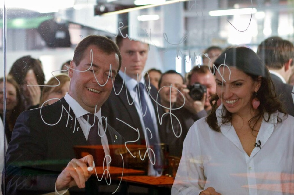 Посещение студии телеканала «Дождь»